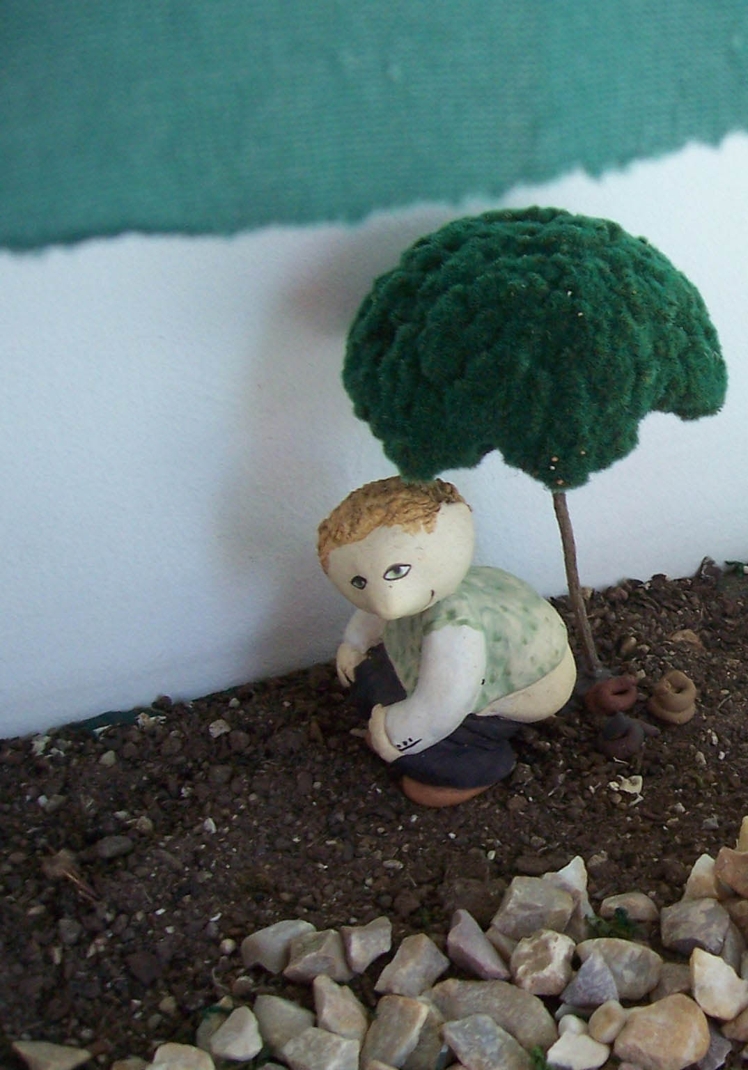 Figurita de barro representando al Caganer catalán, hecha en Coladilla (León, España.